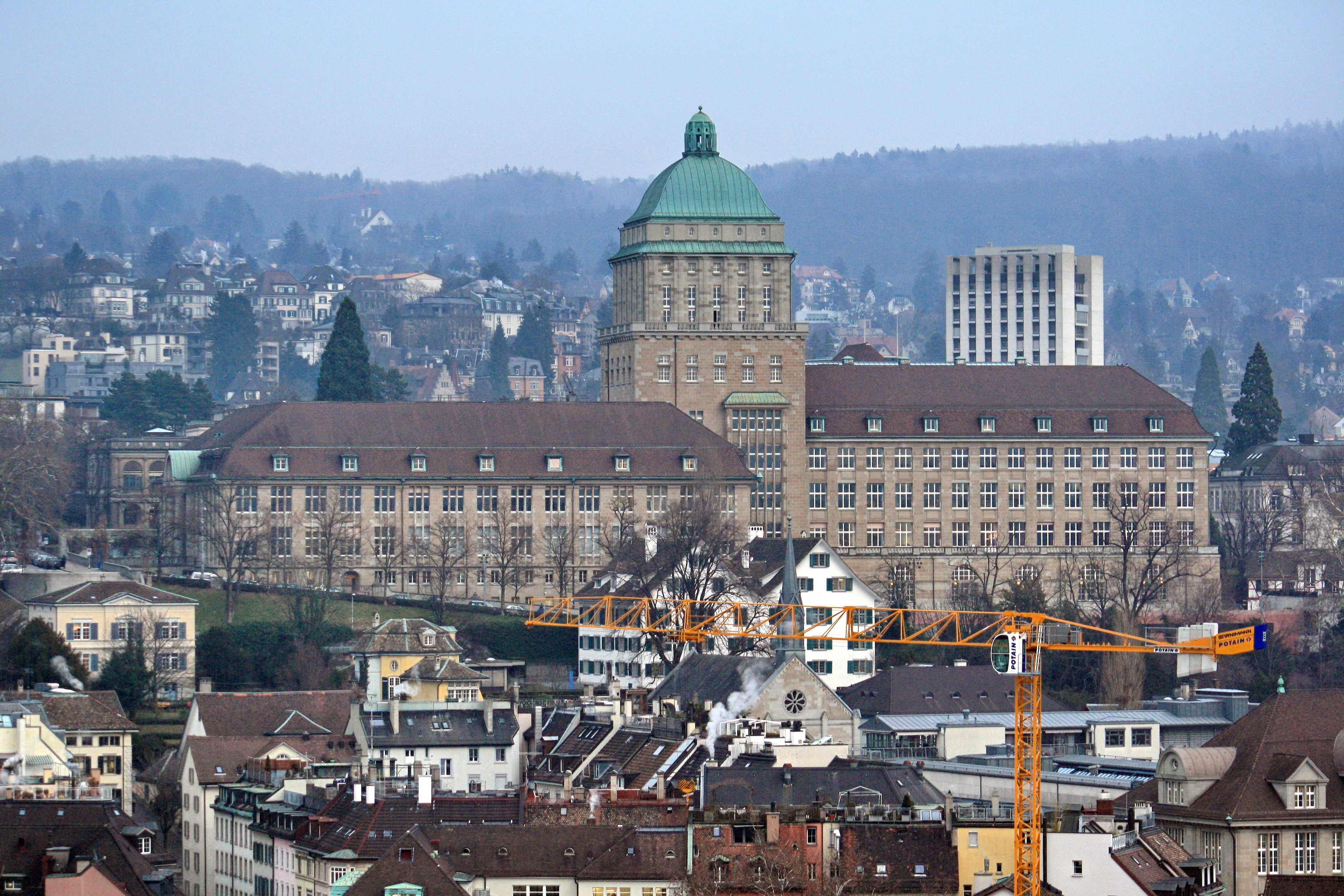 Universität Zürich (Switzerland) as seen from Urania Sternwarte